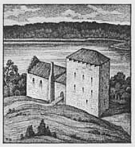 Telge hus rekonstruktionsritning